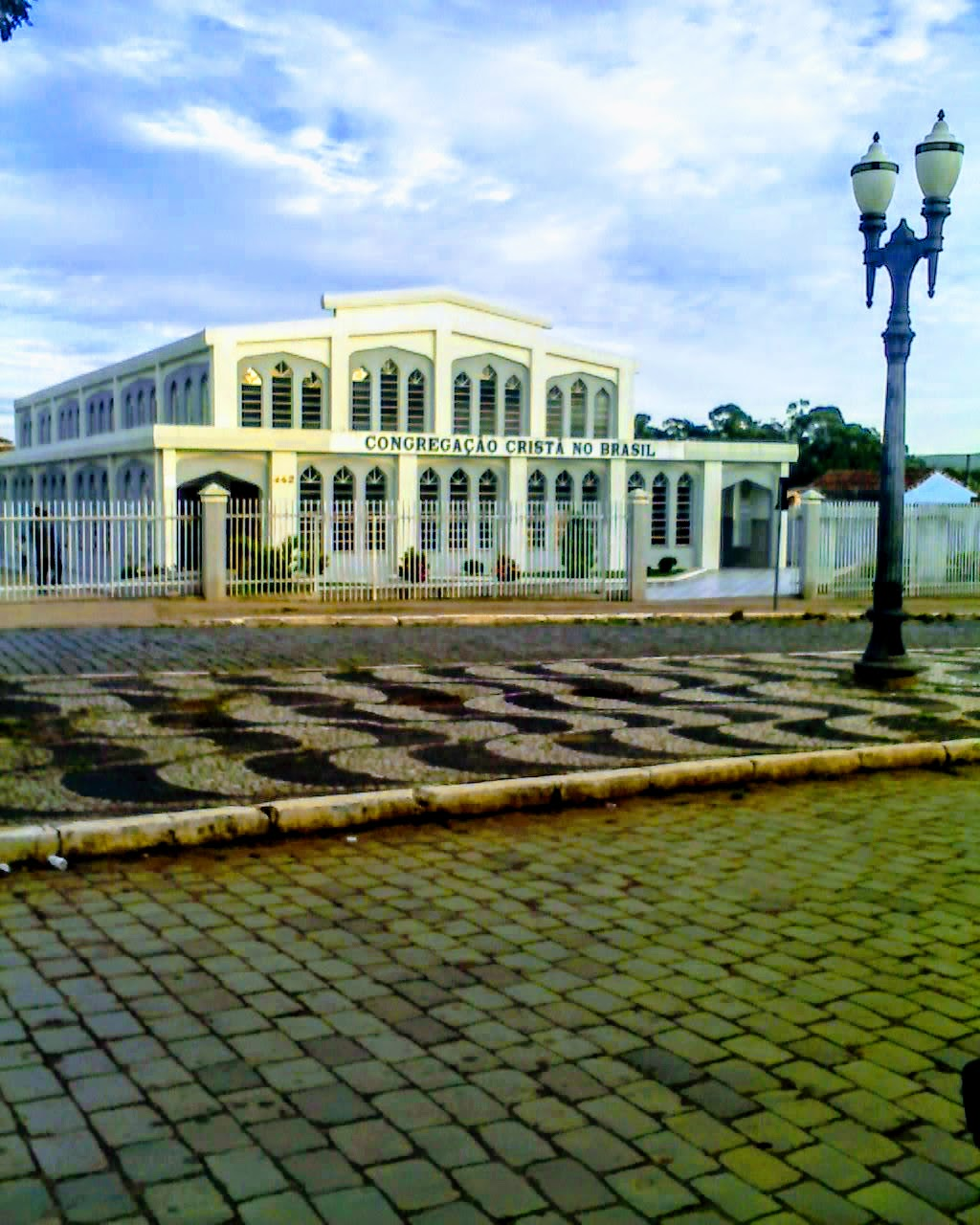 Congregação Cristã no Brasil, Central de Jaguariaíva, no Paraná.